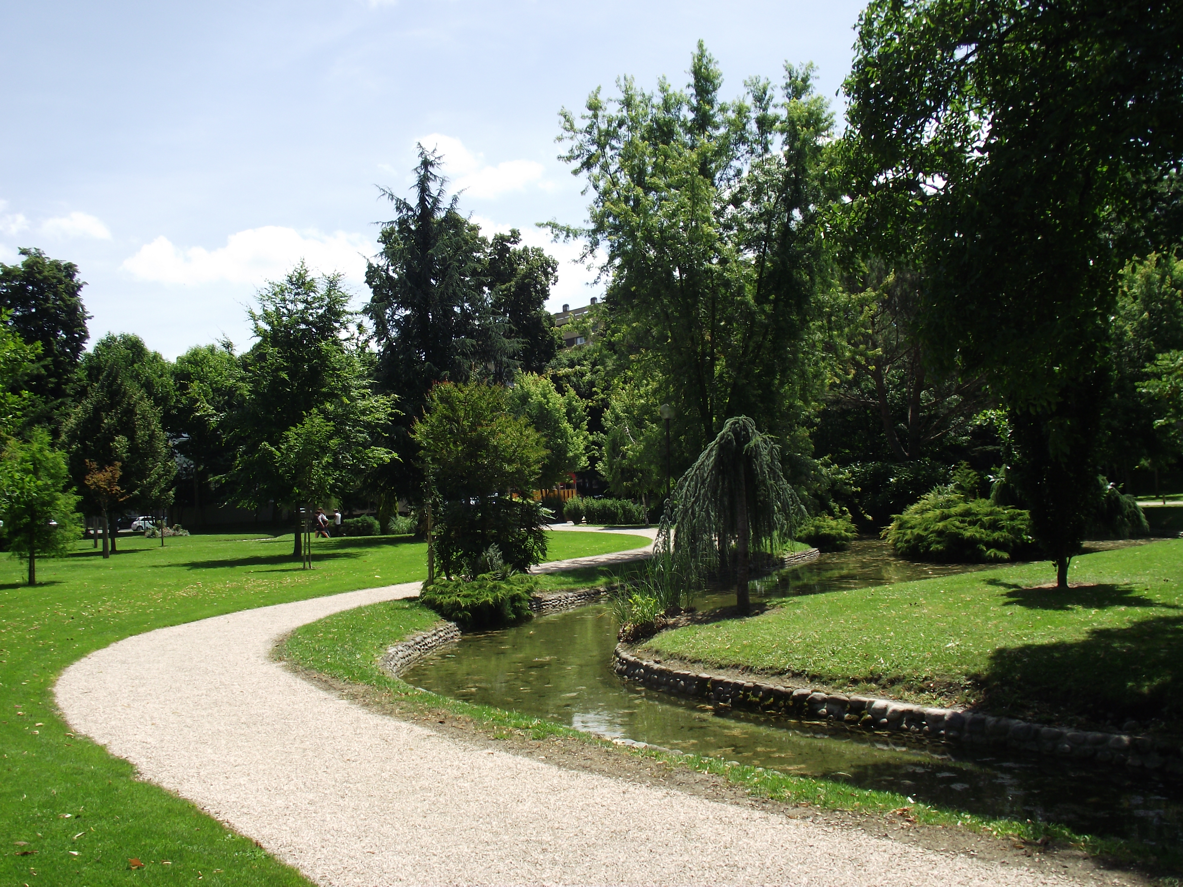 Parc Paul Chastelain — Tarbes, Hautes-Pyrénées, France.